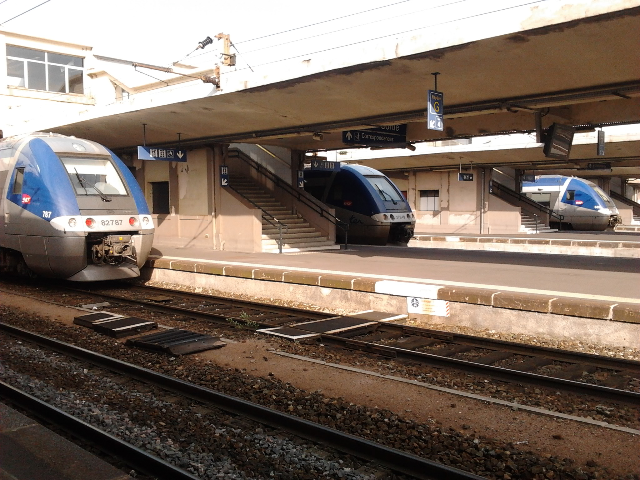 3 AGC (Autorails Grande Capacité) en gare de Mulhouse, le 15 mai 2012.